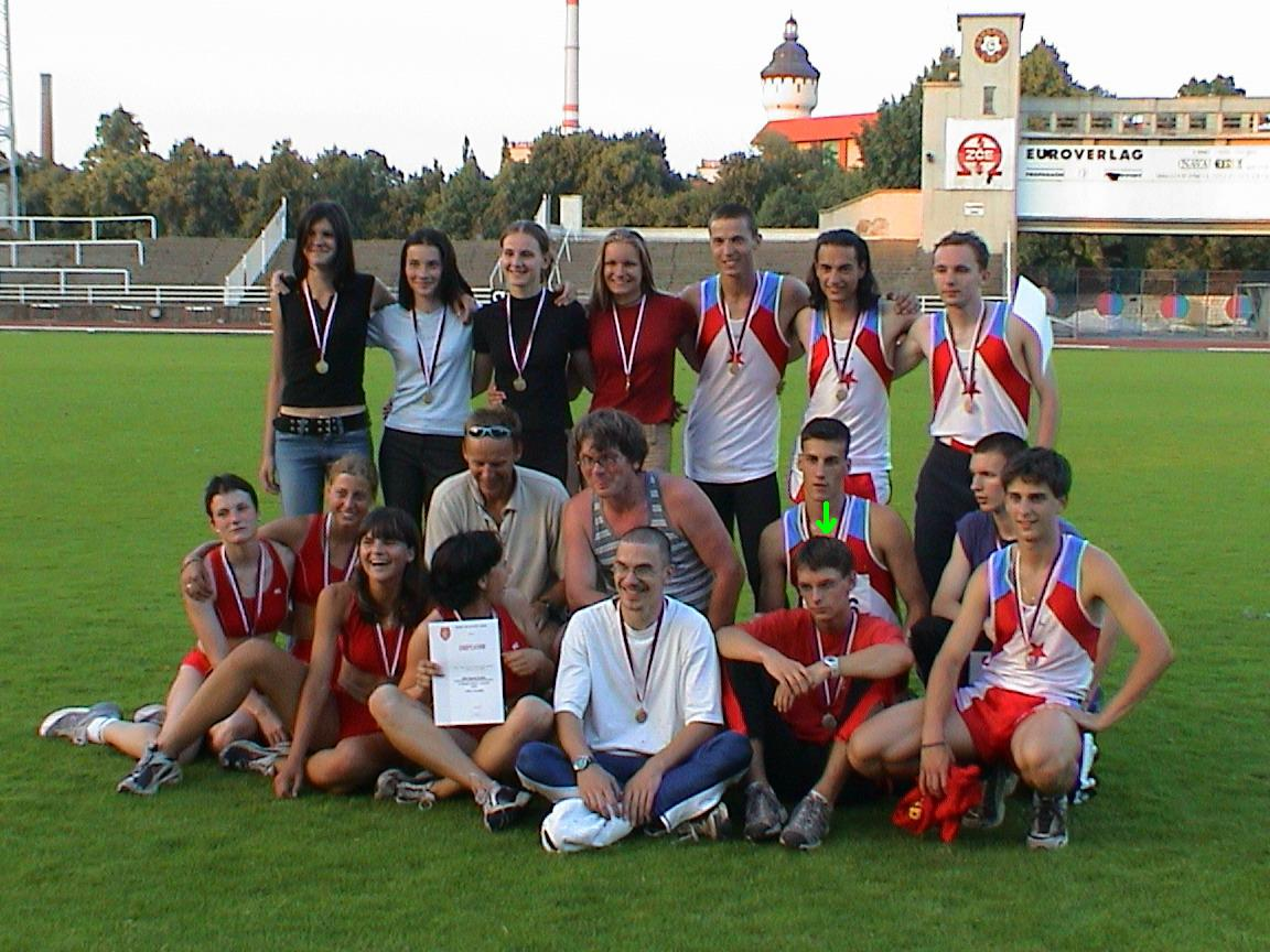 Český atlet Jan Schiller na skupinové fotografii juniorských a dorosteneckých štafet ASK Slavia Praha na Mistrovtví České republiky juniorů a dorostenců v atletice, Plzeň 2002